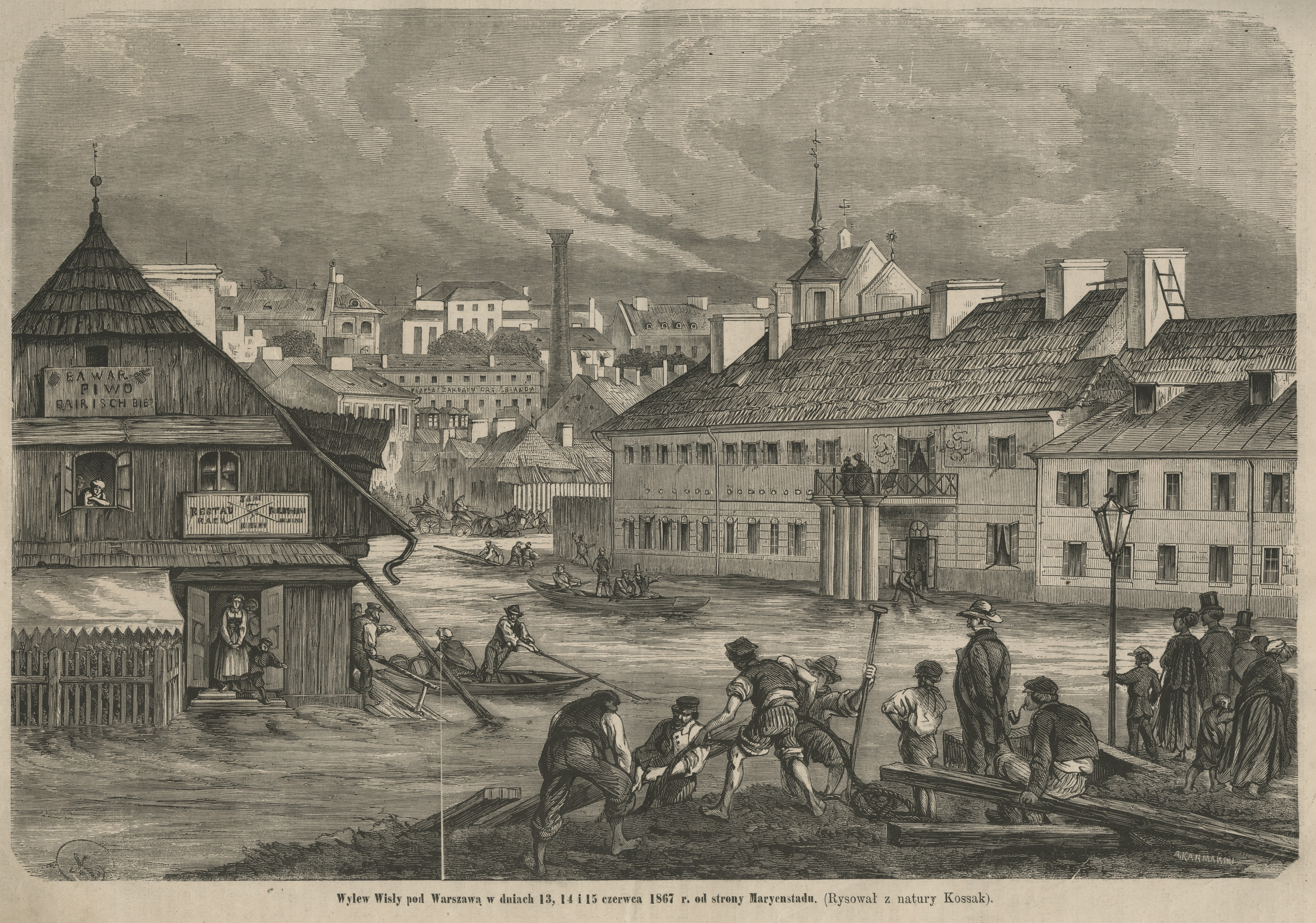 Wylew Wisły pod Warszawą w dniach 13,14 i 15 czerwca 1867 r. od strony Mariensztatu